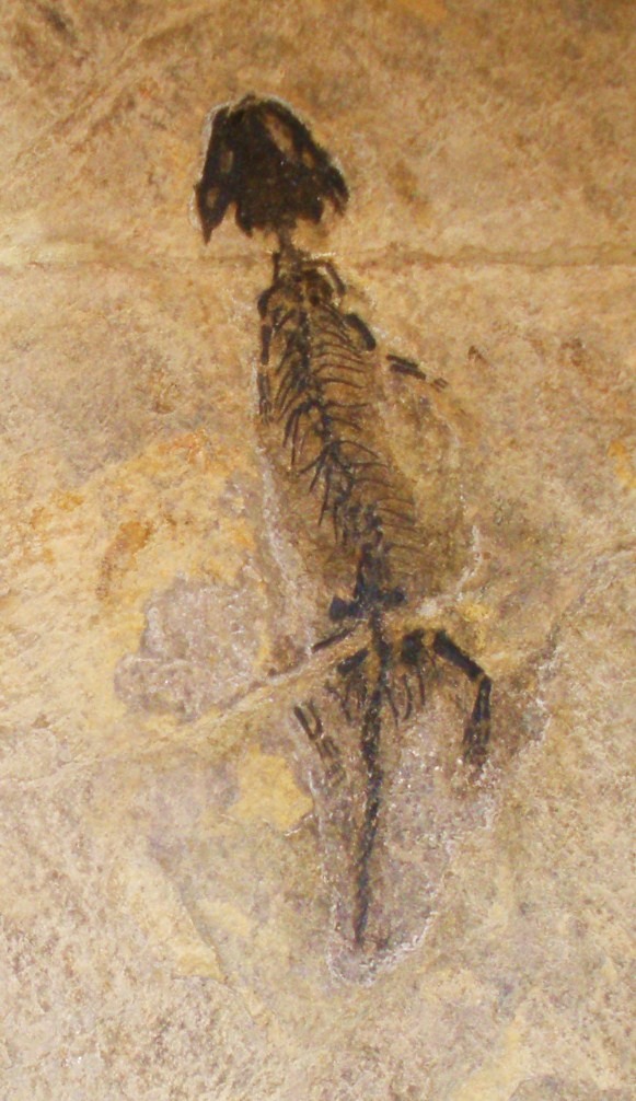 Fossil of Discosauriscus, an extinct amphibian- Took the photo at Fossil Show, Munchen 2011